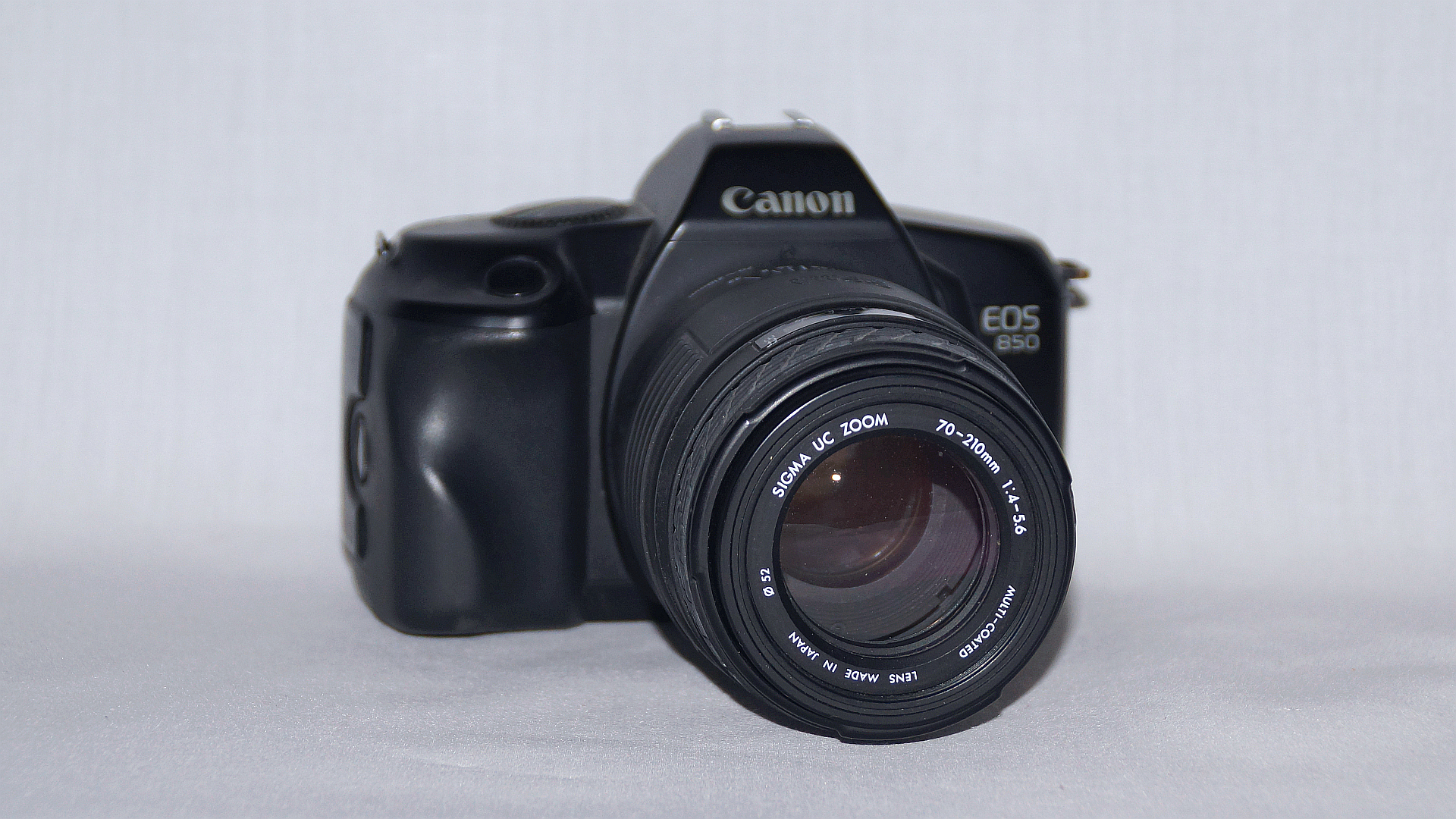 5 Sigma UC zoom 70-210 - f4-5.6 m-c an EOS 850 - Foto Wolfgang Pehlemann DSC04871.jpg